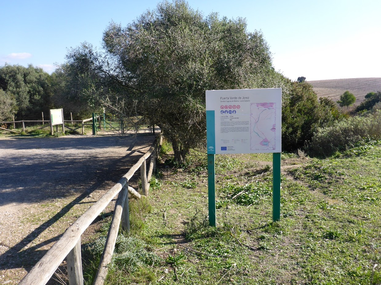 Puerta Verde de Jerez en la Laguna de Medina (Jerez de la Frontera, España)